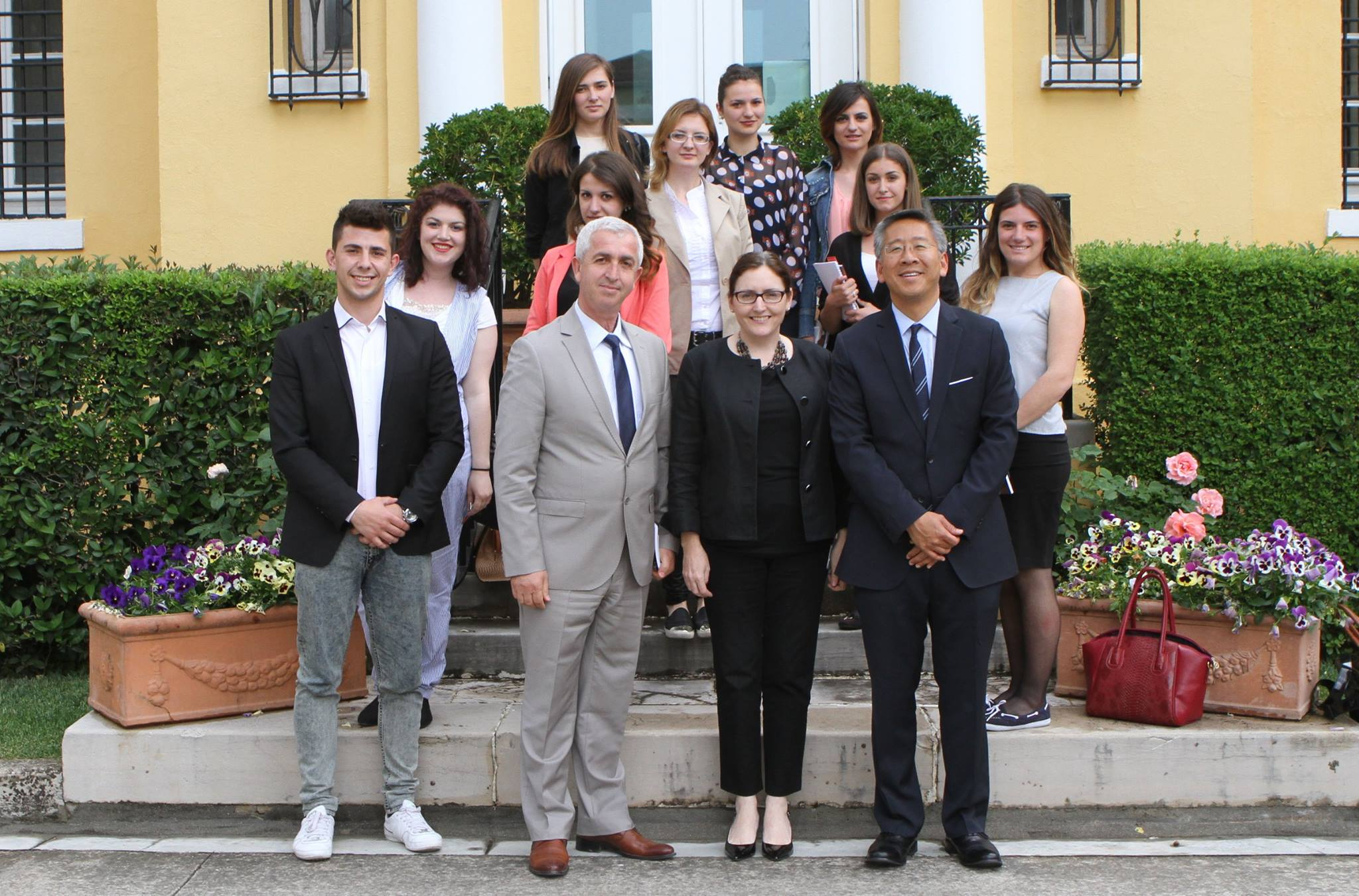 Ambasadori Amerikan